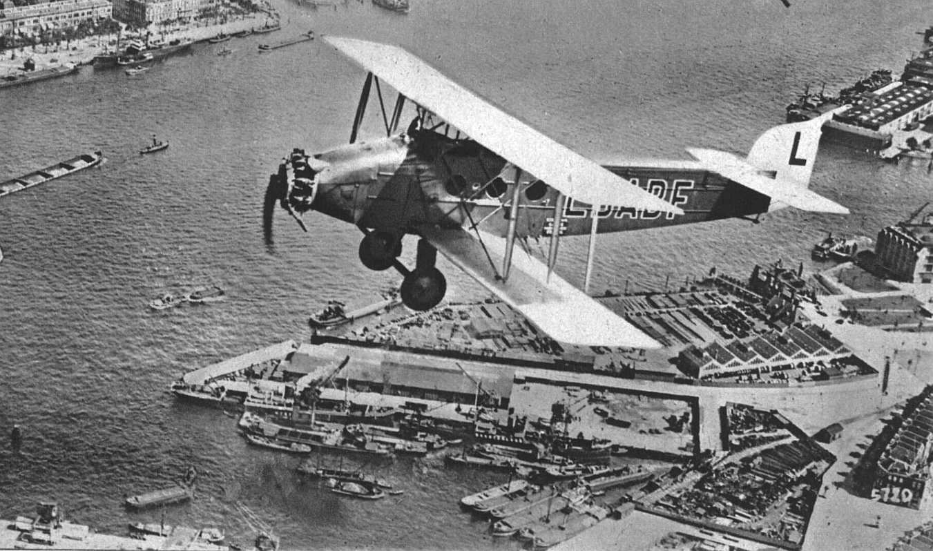 Walter Jupiter IV a letoun Avia BH-25 na lince Praha-Rotterdam nad rotterdamským přístavem